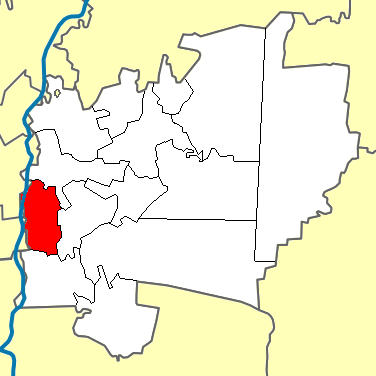 Ішимбайське міське поселення